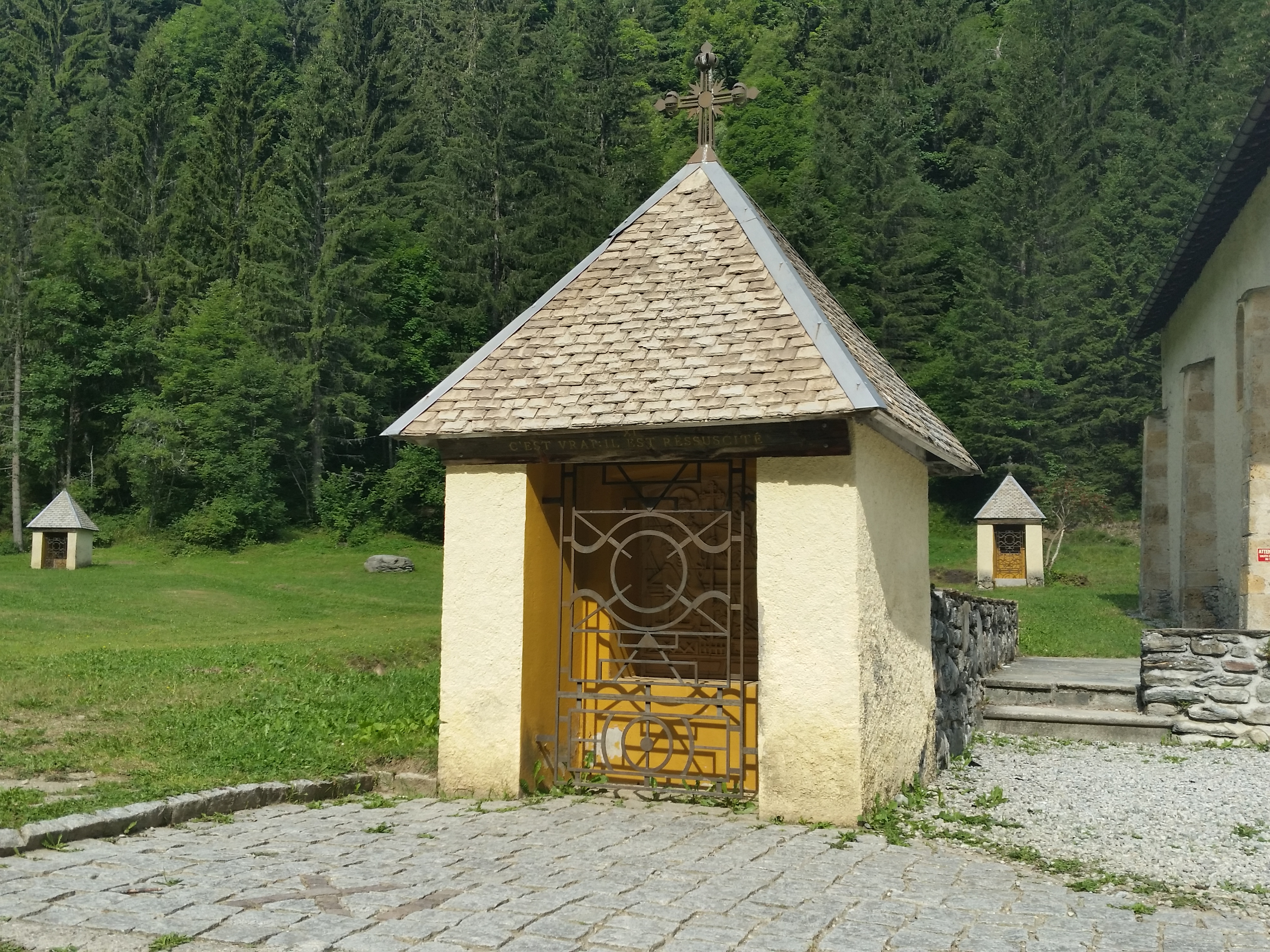 Le chemin de croix de l'église est extérieur, avec de petites chapelles disposées tout autour.